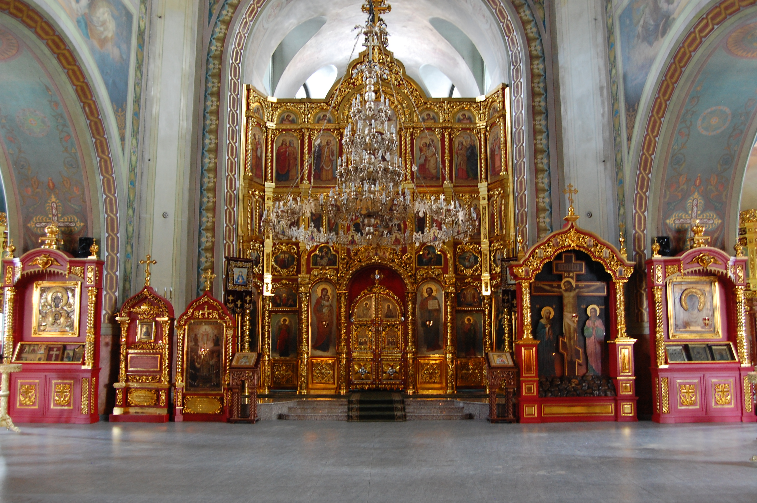 Главный придел в честь Всемилостивейшего Спаса